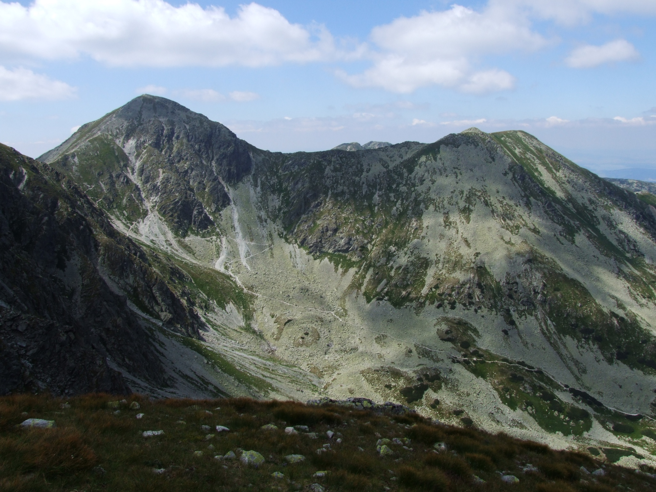 Pachoľ a, Spálená (Pachola, Spalona Kopa) - West Tatra Mountains